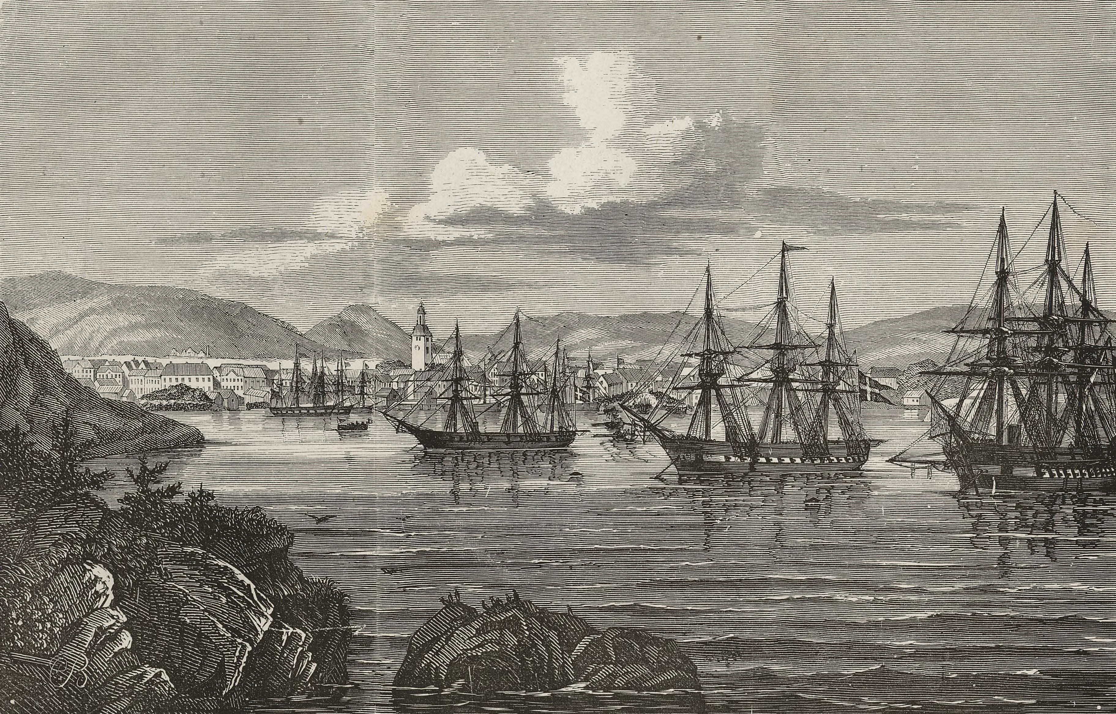 Staden Kristiansand i Norge, med danska örloggsskepp på redden. Illustrasjon hentet fra boken Nordiska taflor av ukjent forfatter og utgitt av Albert Bonnier (se, 1873)